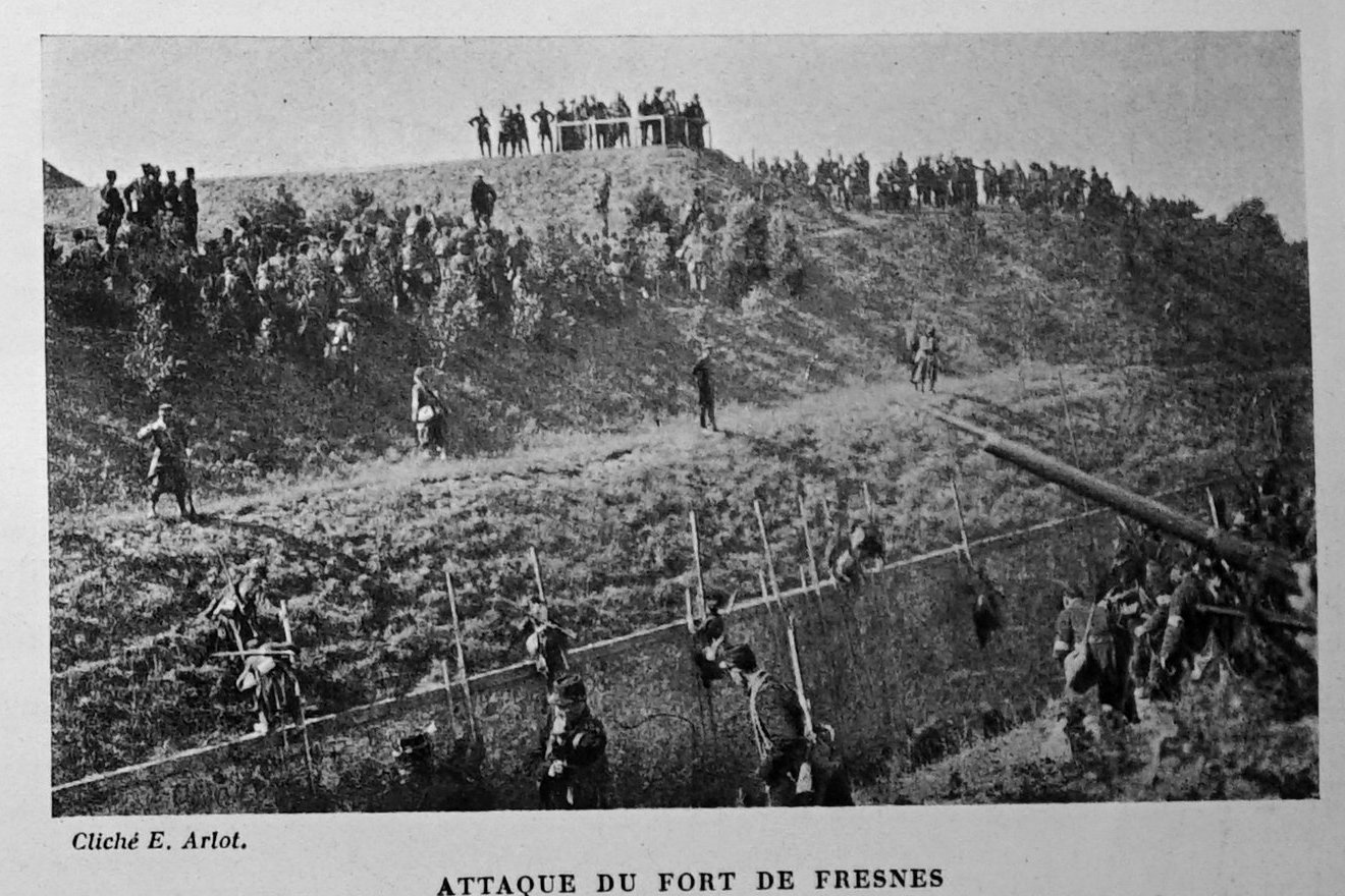 publié dans le "Revue régionale illustrée".